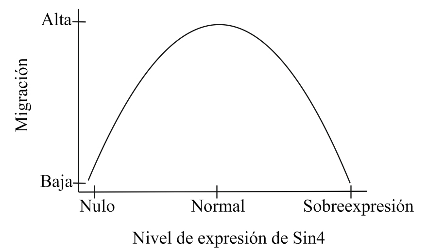 Efecto de la manipulación de los niveles de SDC4 en la migración de las células